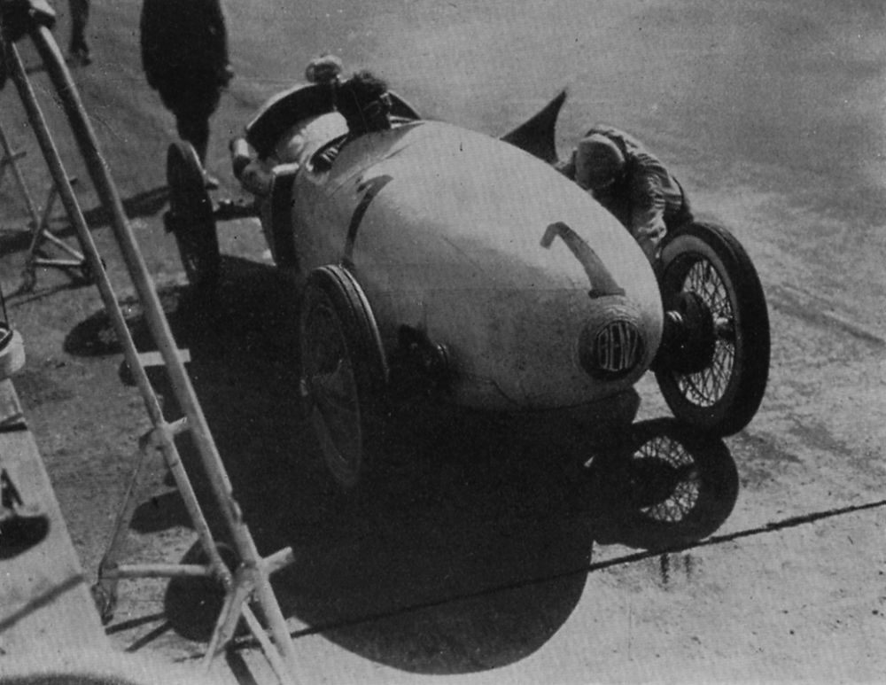 Abb. 35. Benz 2-Ltr.-Rennwagen mit Heckmotor und in Tropfenform. 1923